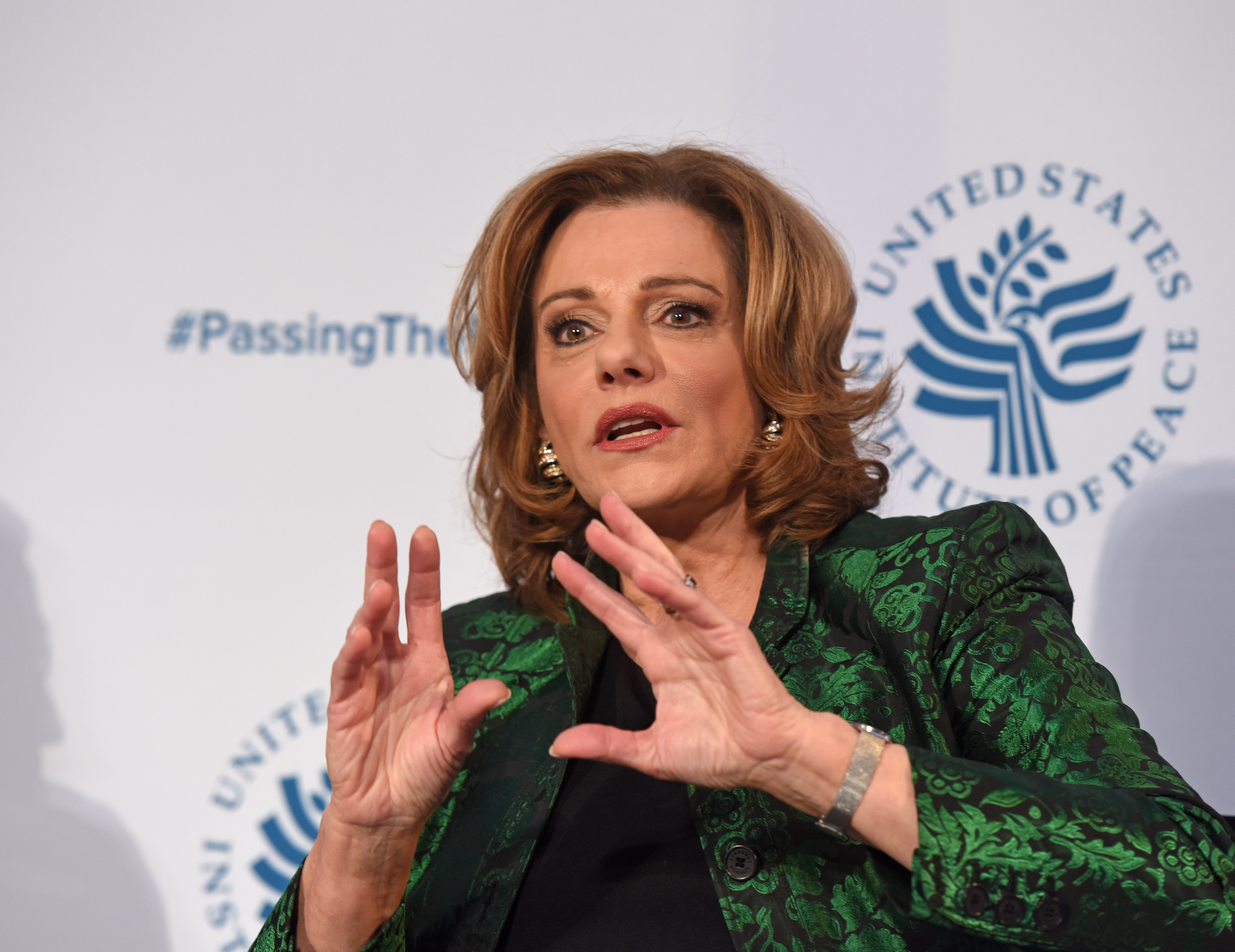 K.T. McFarland